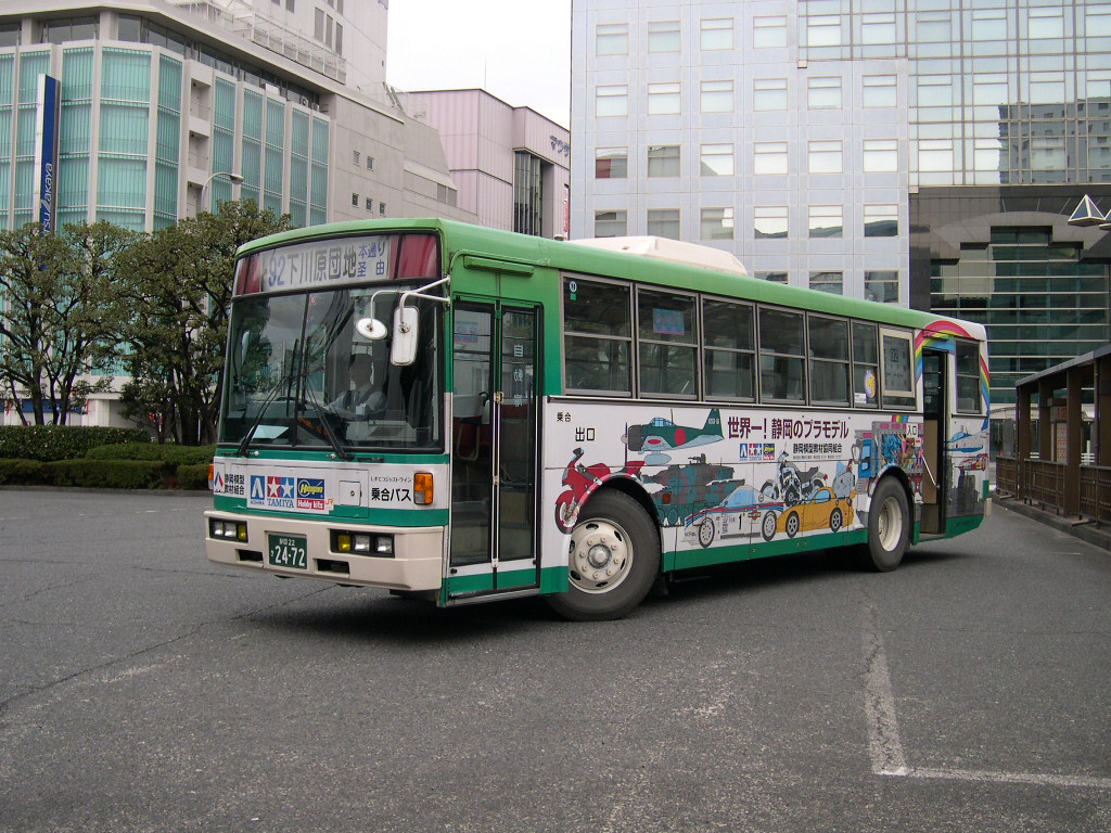 静岡駅前にて 2004-1-11 撮影